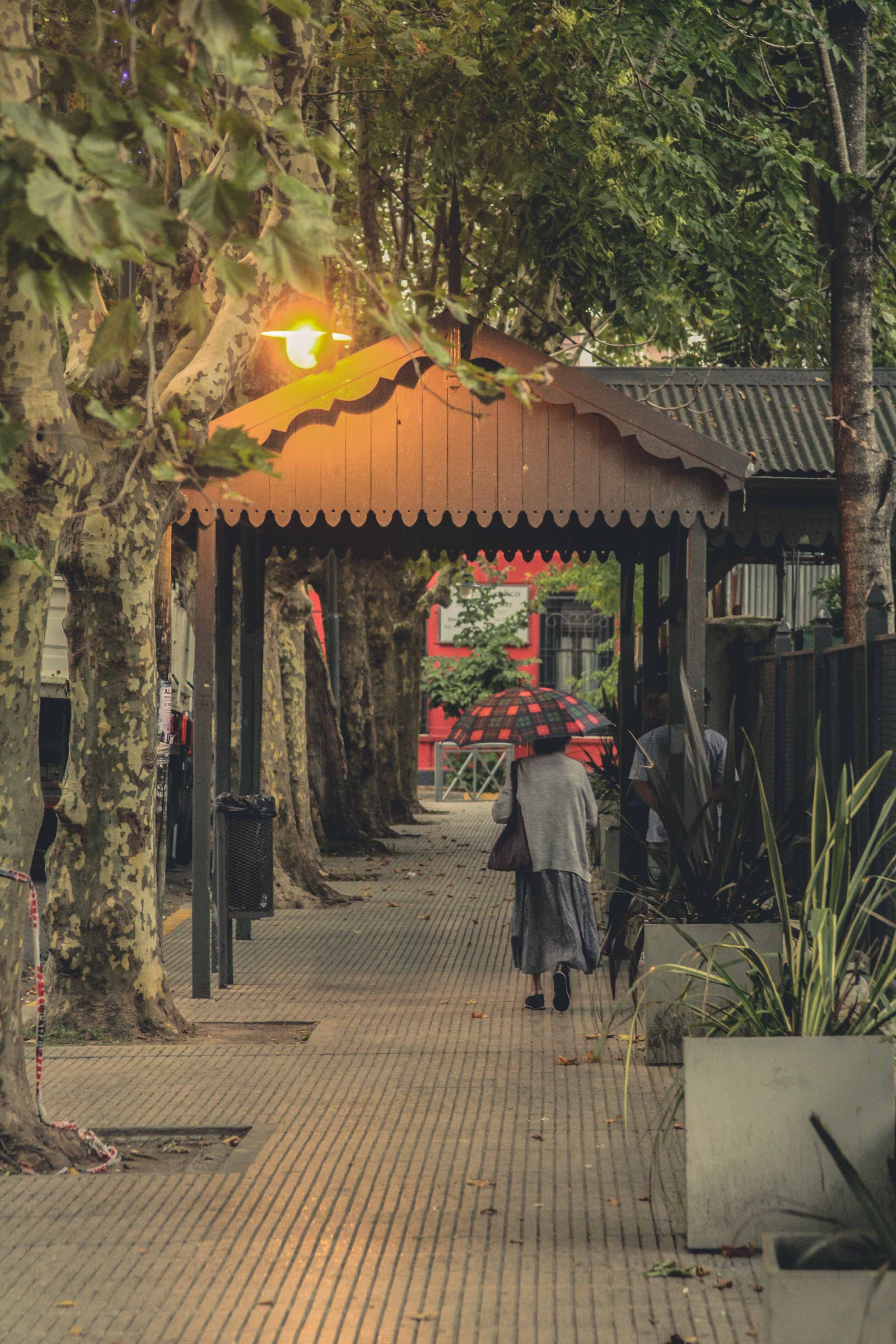 Señora caminando hacia la entrada de la estación San Fernando del ramal Mitre.